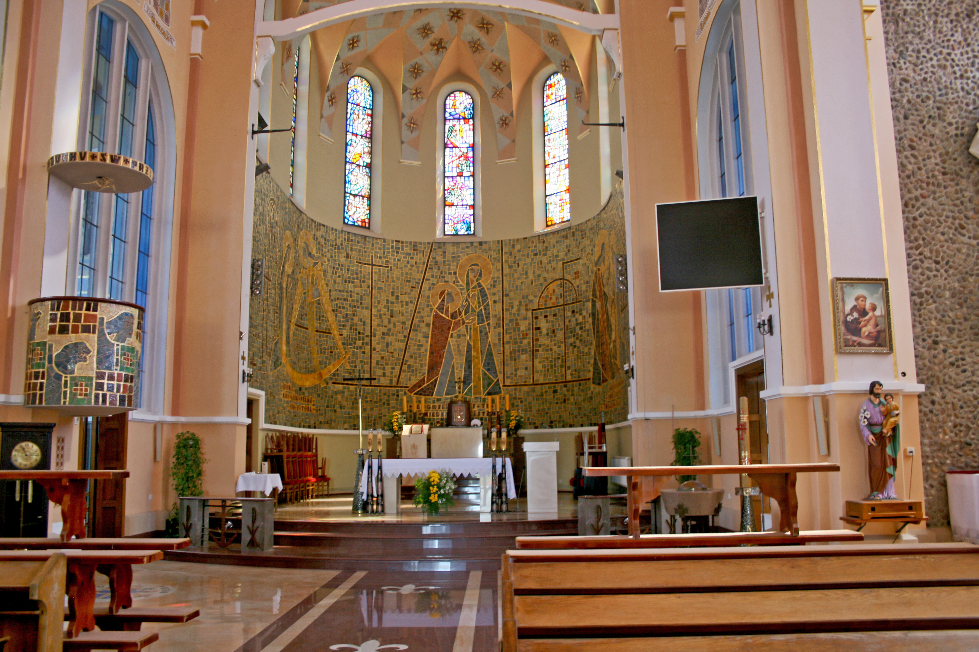 Wnętrze kościoła pw. Nawiedzenia NMB w Medyni Głogowskiej. Projektował prof. Jan Budziło